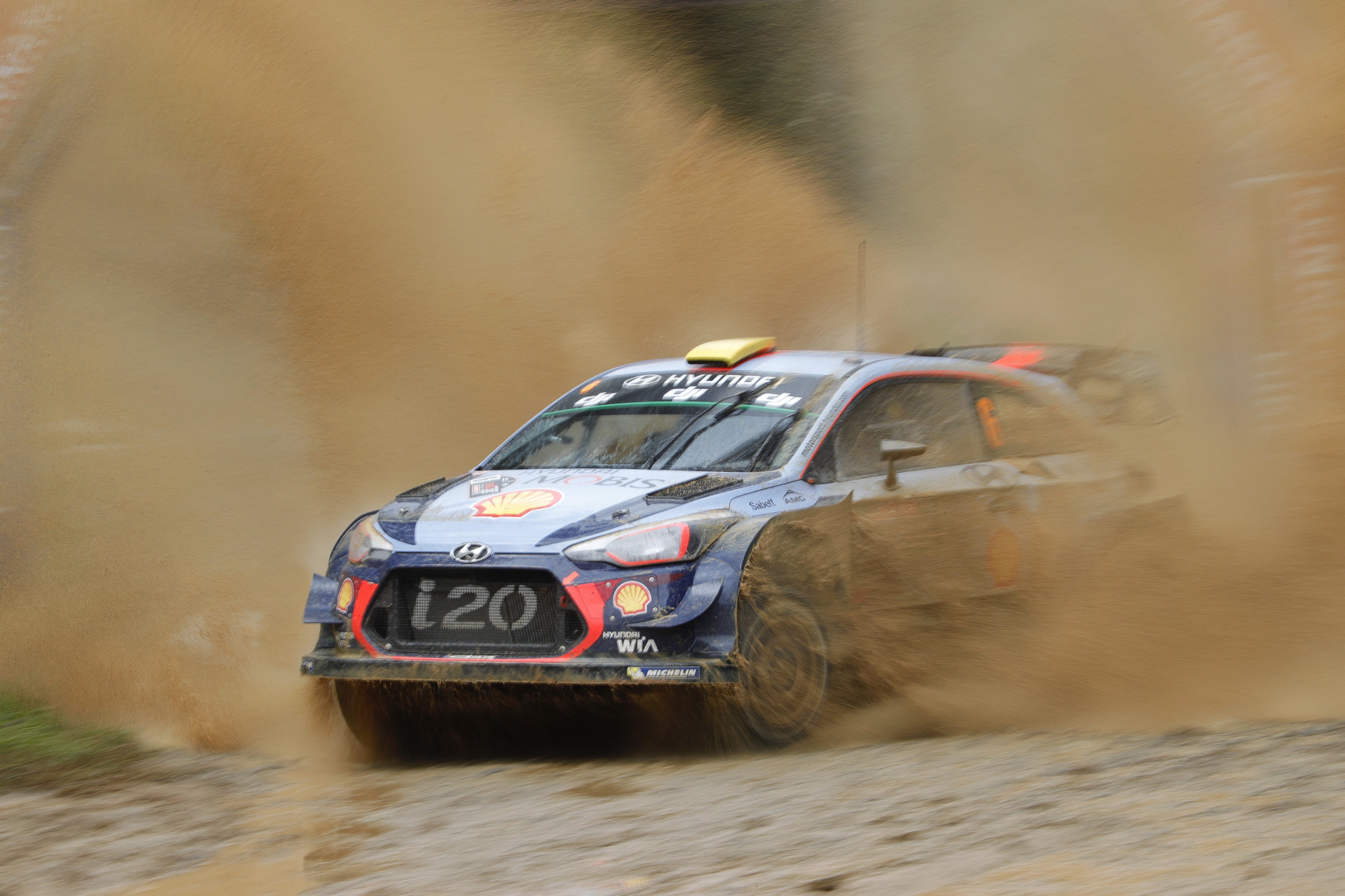 Andreas Mikkelsen podczas Rajdu Austarlii 2017